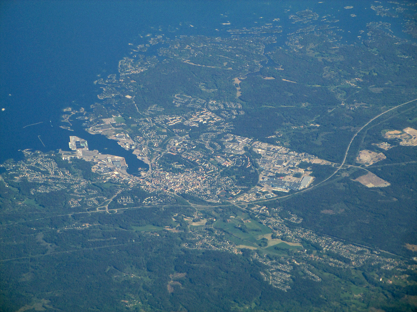 Stadt Oskarshamn, Schweden